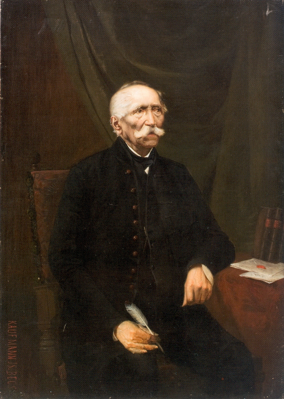 Boczkó Dániel magyar földbirtokos, képviselő, kormánybiztos.